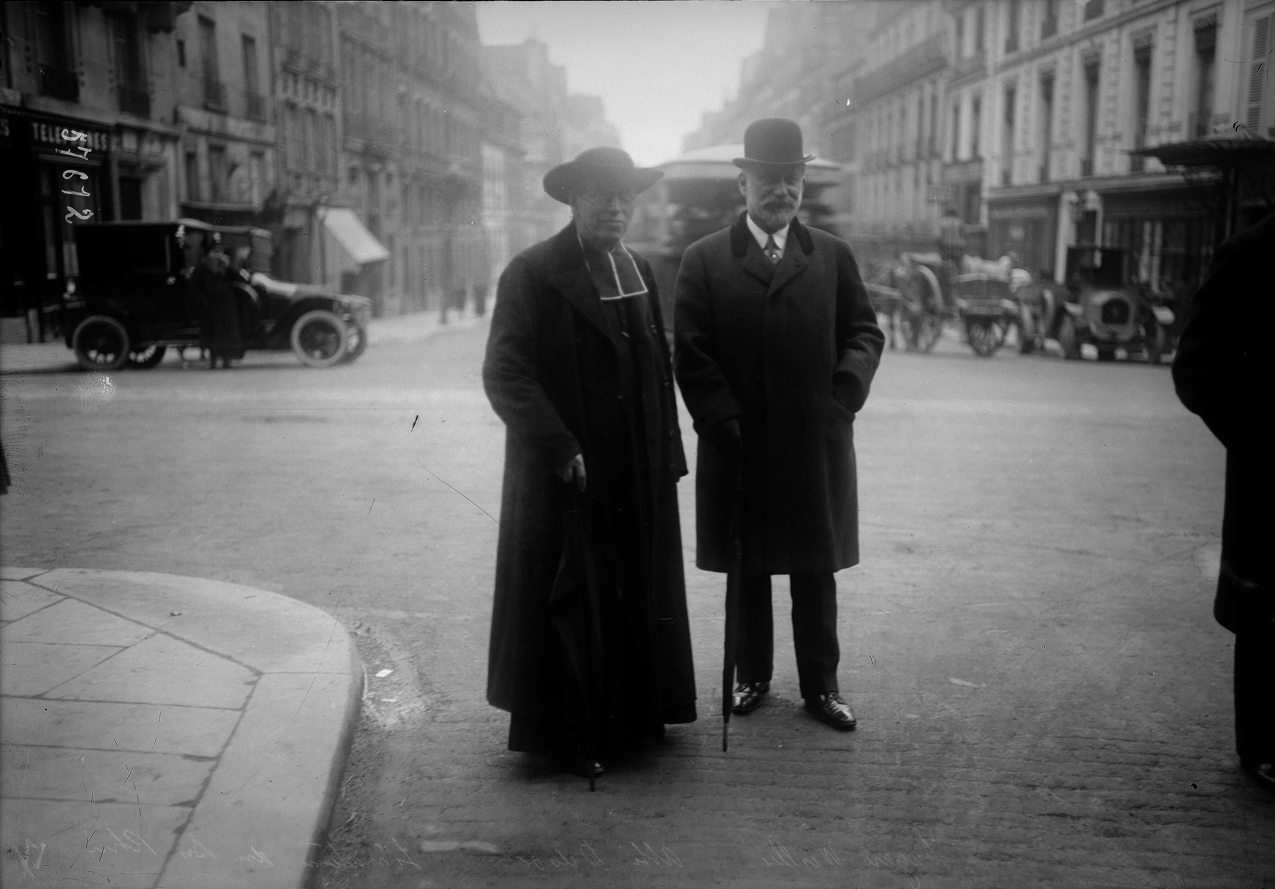 [Jean] Lazare Weiller, l'abbé [Nicolas] Delsor, sénateurs du Bas-Rhin : [photographie de presse]